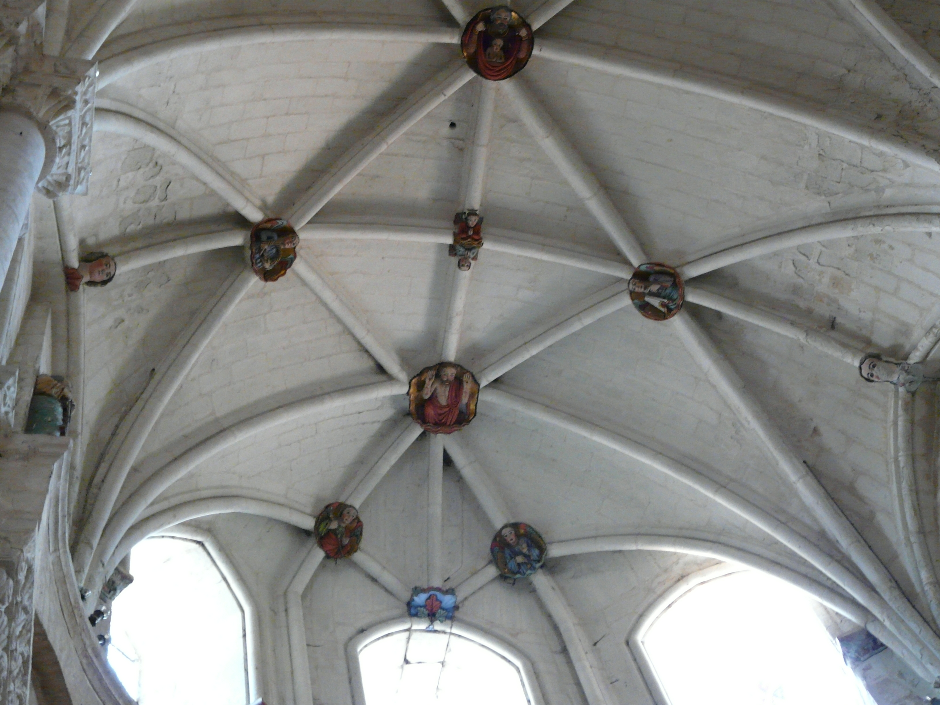 Le plafond du chœur de l'église abbatiale Saint-Pierre d'Airvault, Deux-Sèvres, France